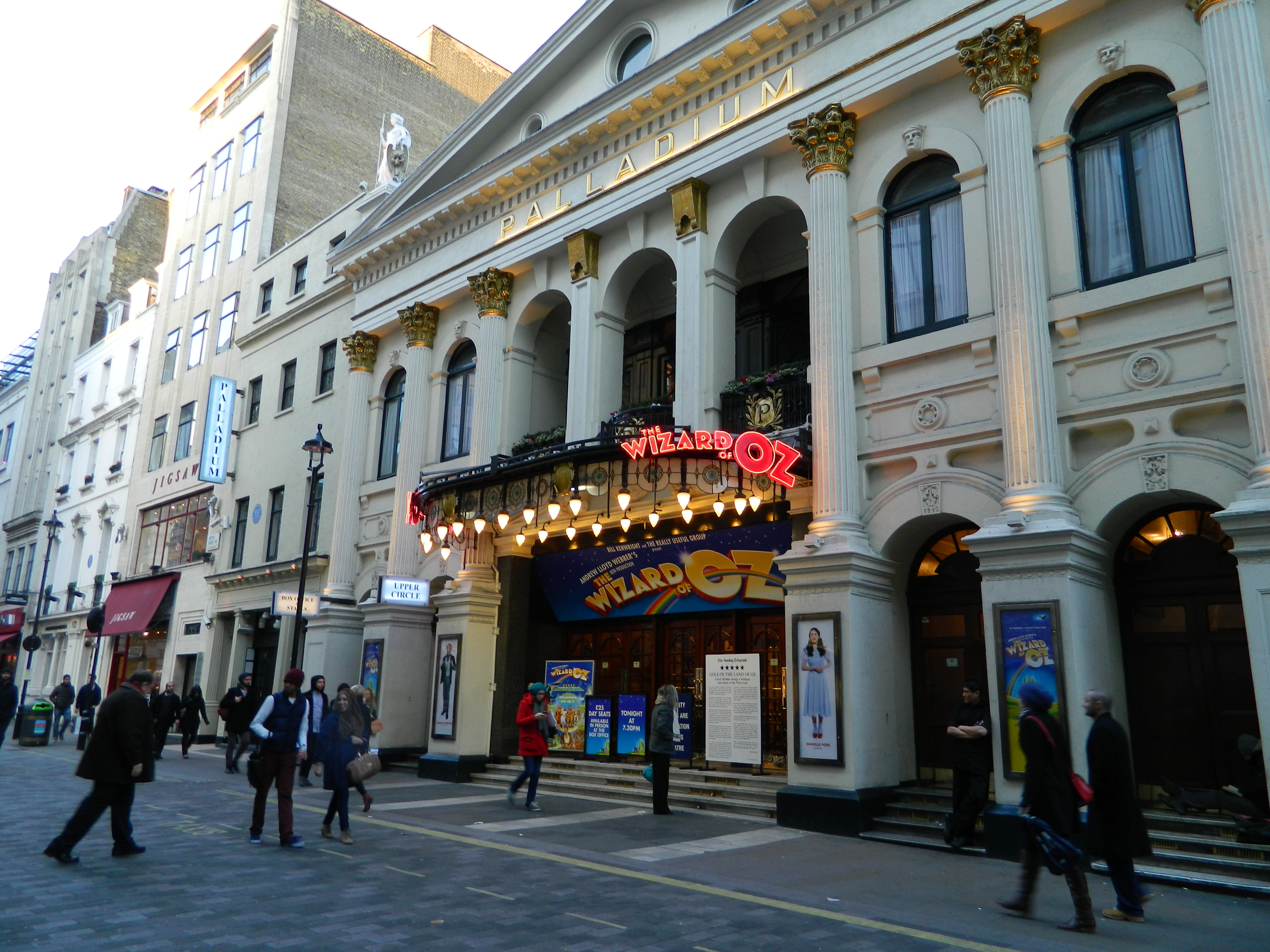 London